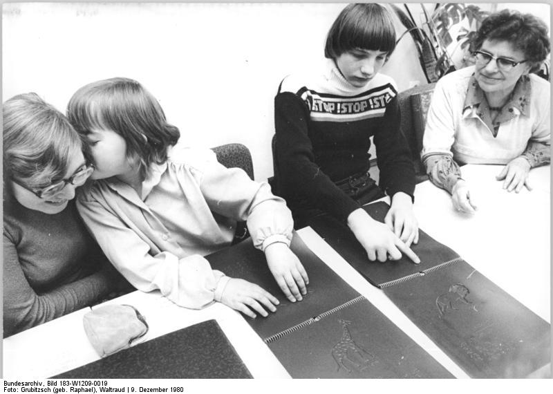 Leipzig, Jugendstunde in einer Blindenbücherei ADN-ZB Grubitzsch 9.12.80 Leipzig: Blindenbücherei. Zu Gast in der Blindenbücherei in Leipzig sind diese Jungen und Mädchen von der Blindenschule in Karl-Marx-Stadt, die im nächsten Jahr die Jugendweihe erhalten werden. Sie können sich mit der neuesten Literatur bekanntmachen, denn in der Zentralbücherei für Blinde stehen zur Ausleihe rund 7500 Werke in über 25000 Bänden sowie mehr als 6000 Musiktitel bereit. Außerdem können sich Interessenten über 3500 Titel Hörliteratur und Reliefs ausleihen, auch per Fernleihe (sihe 18, 17 und 20N)